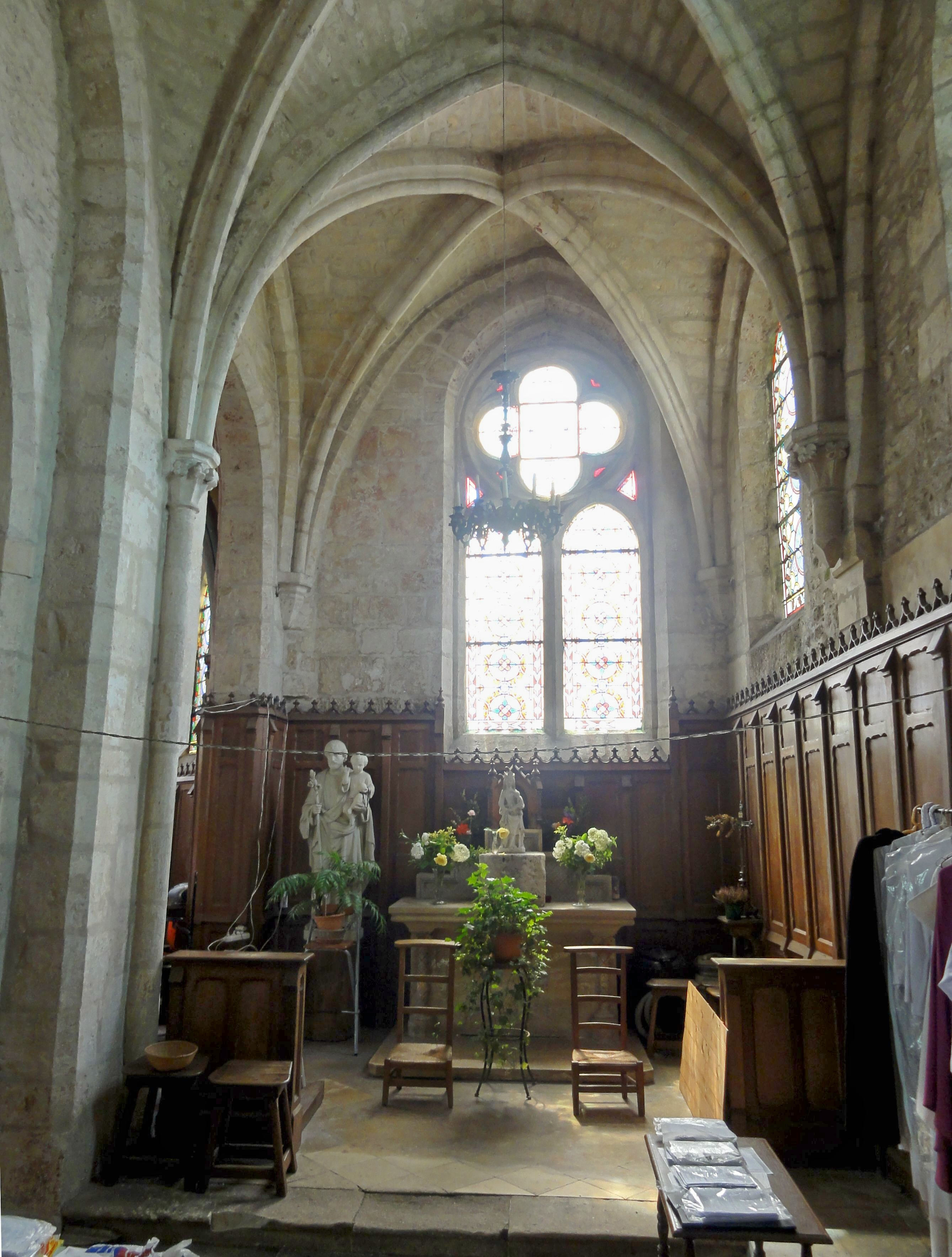 Chapelle sud (chapelle Saint-Médard), vue vers l'est en direction du chevet.